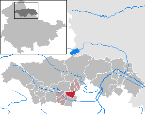 Topfstedt in Thuringia - Kyffhäuserkreis